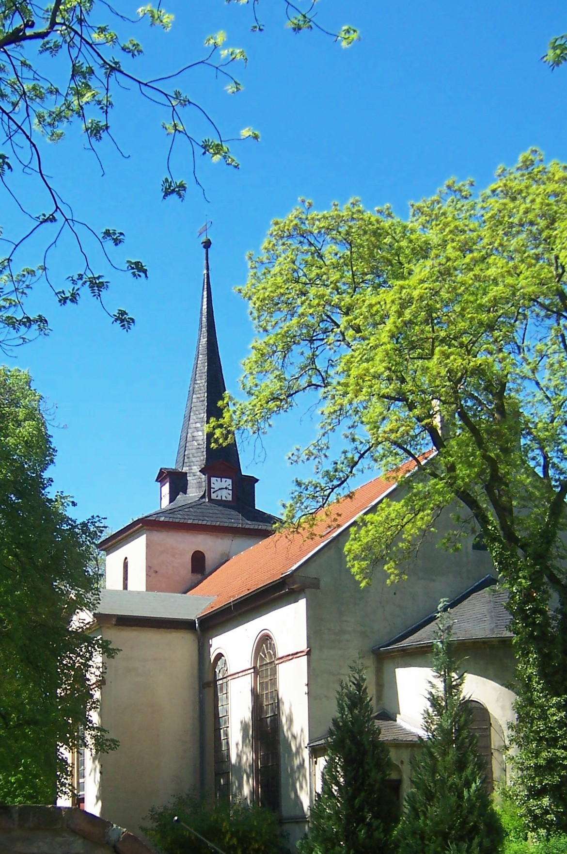 Kirche St. Laurentii in Reinstedt